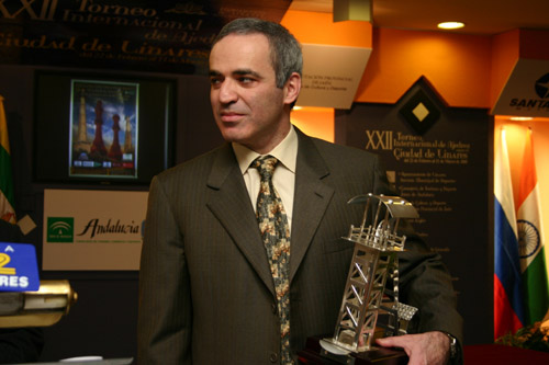 Garry Kasparov à Linares en 2005